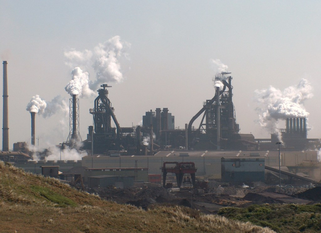 Koninklijke Hoogovens at IJmuiden, Holland